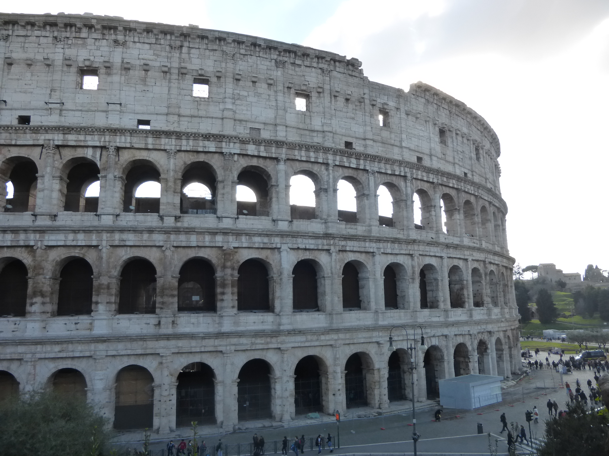 Roma, Colosseo appena sbiancato, da via Nicola Salvi